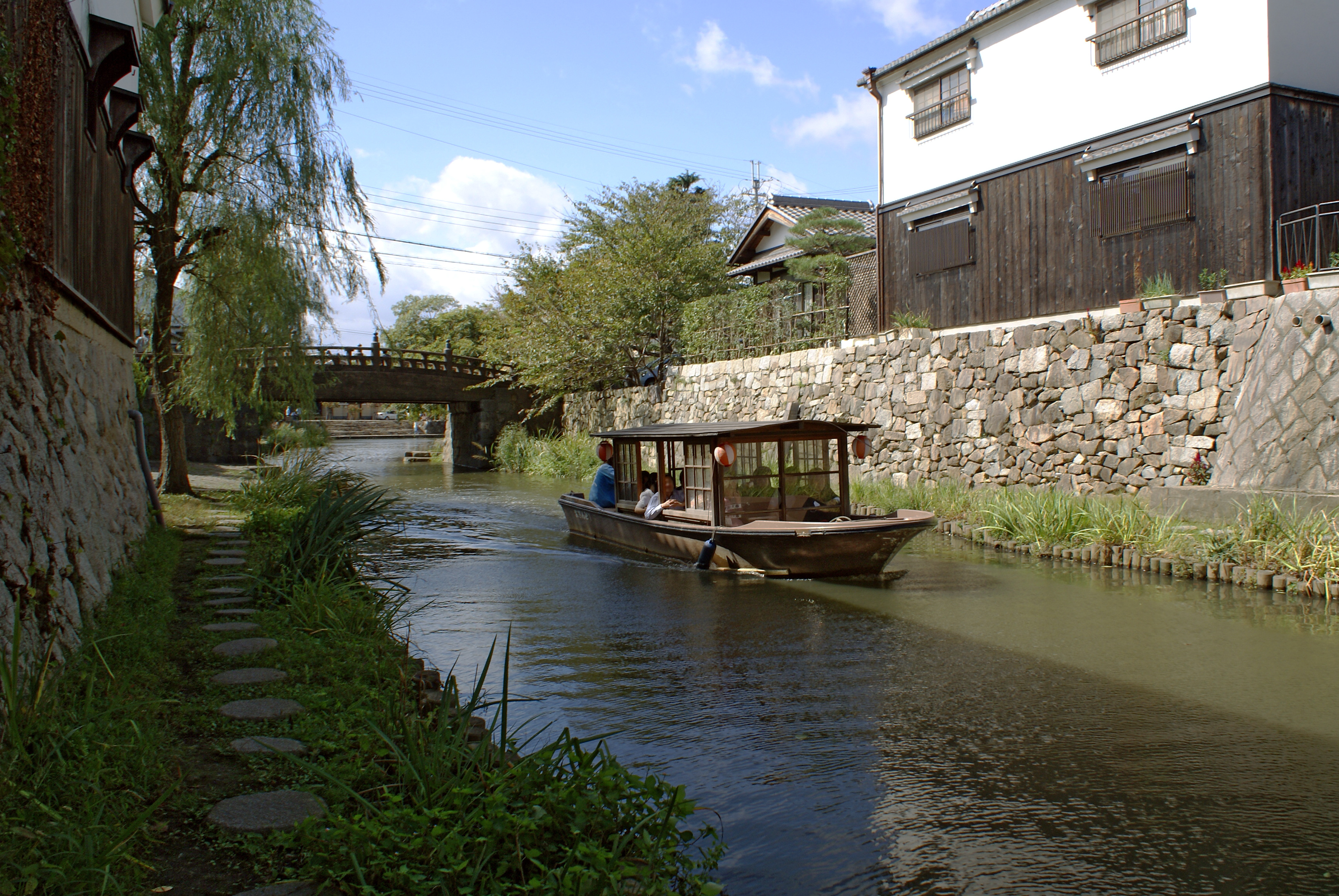 Hachimanbori in Omihachiman, Shiga, Japan